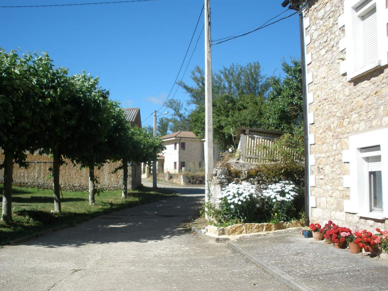 Fuente Úrbel (municipio de Basconcillos del Tozo, Burgos)